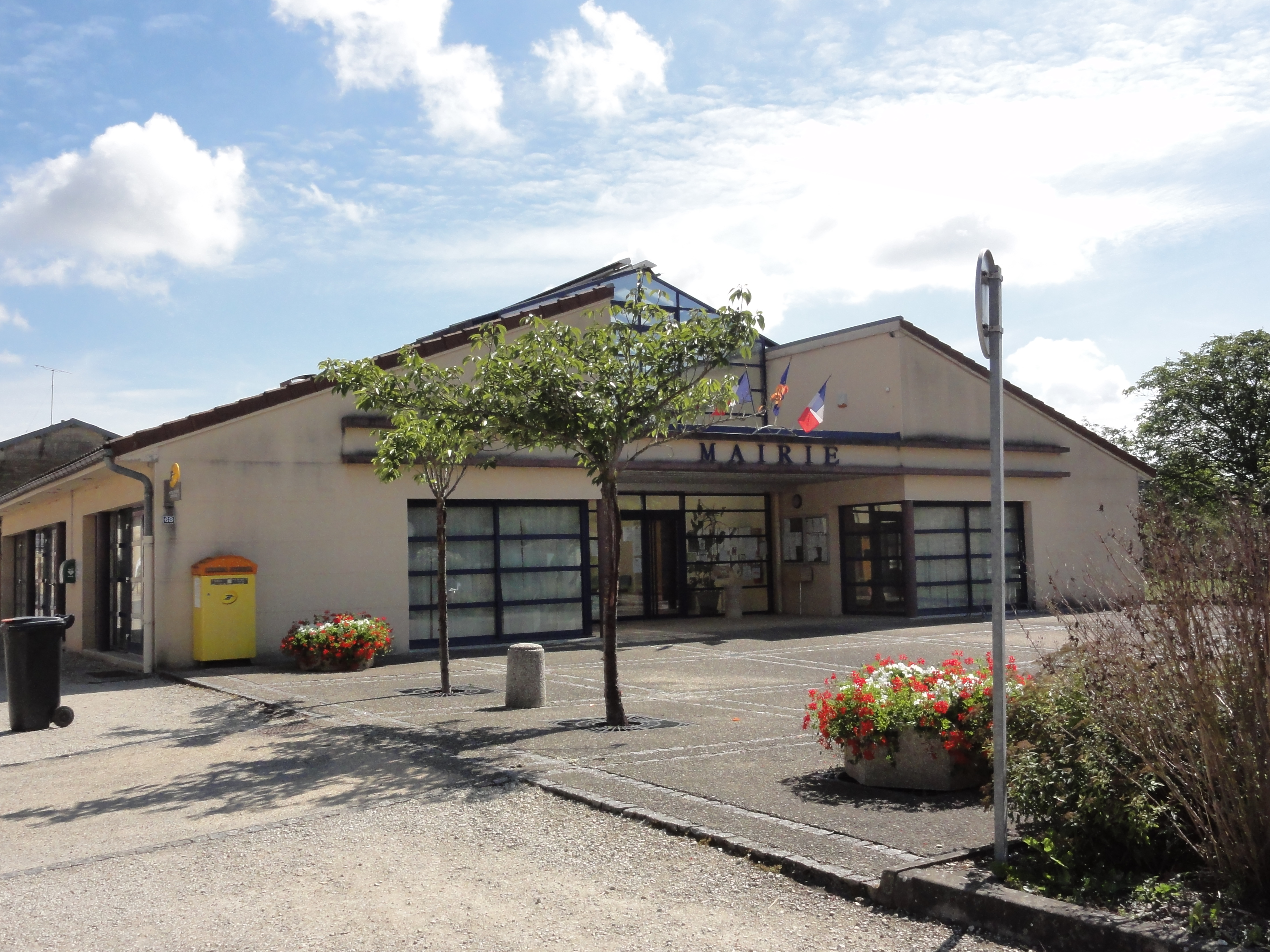 Contrisson (Meuse) mairie